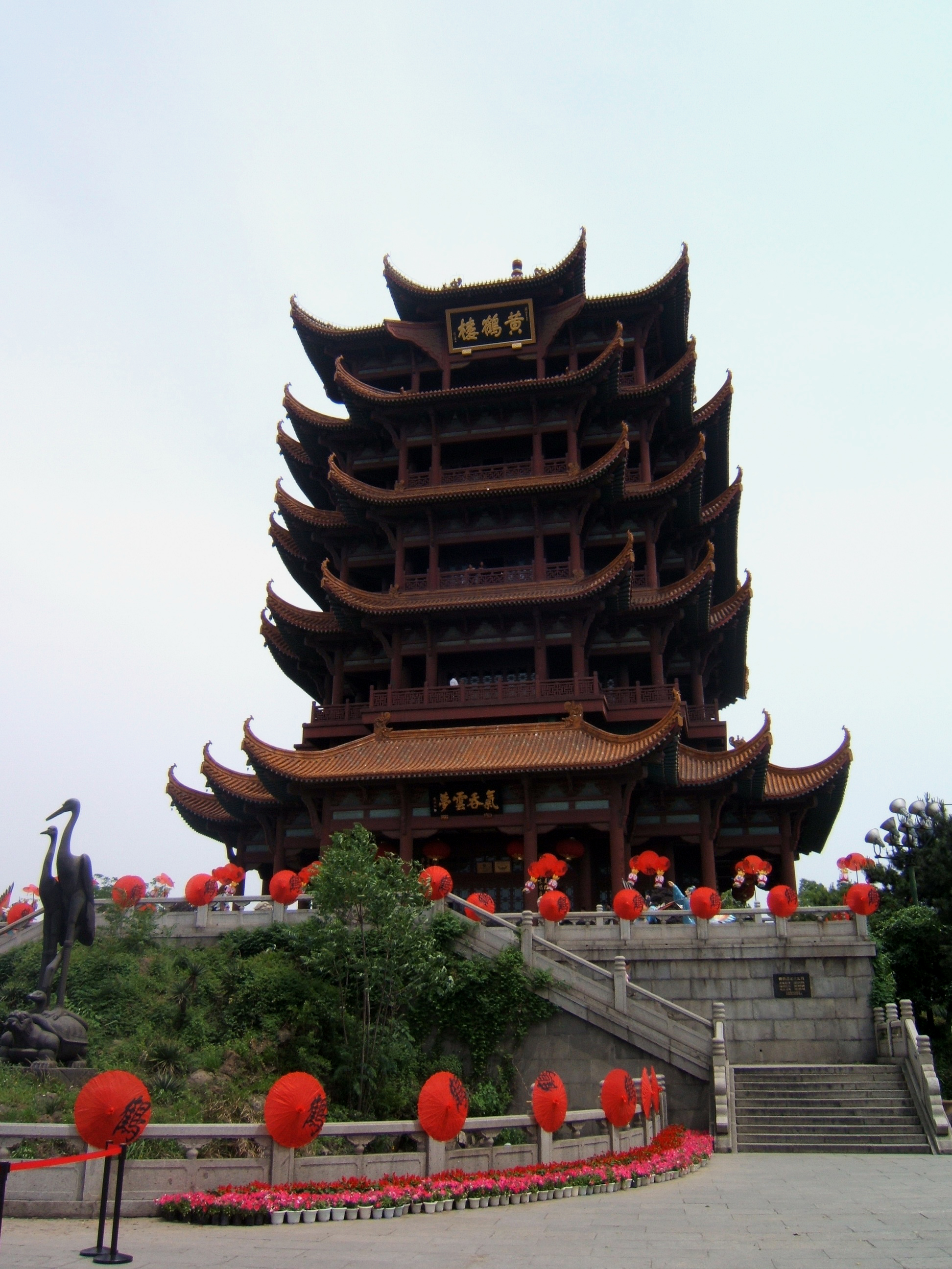 黄鹤楼，Dice摄于2006年4月30日Bân-lâm-gú: Hông-ho̍h-lâu.